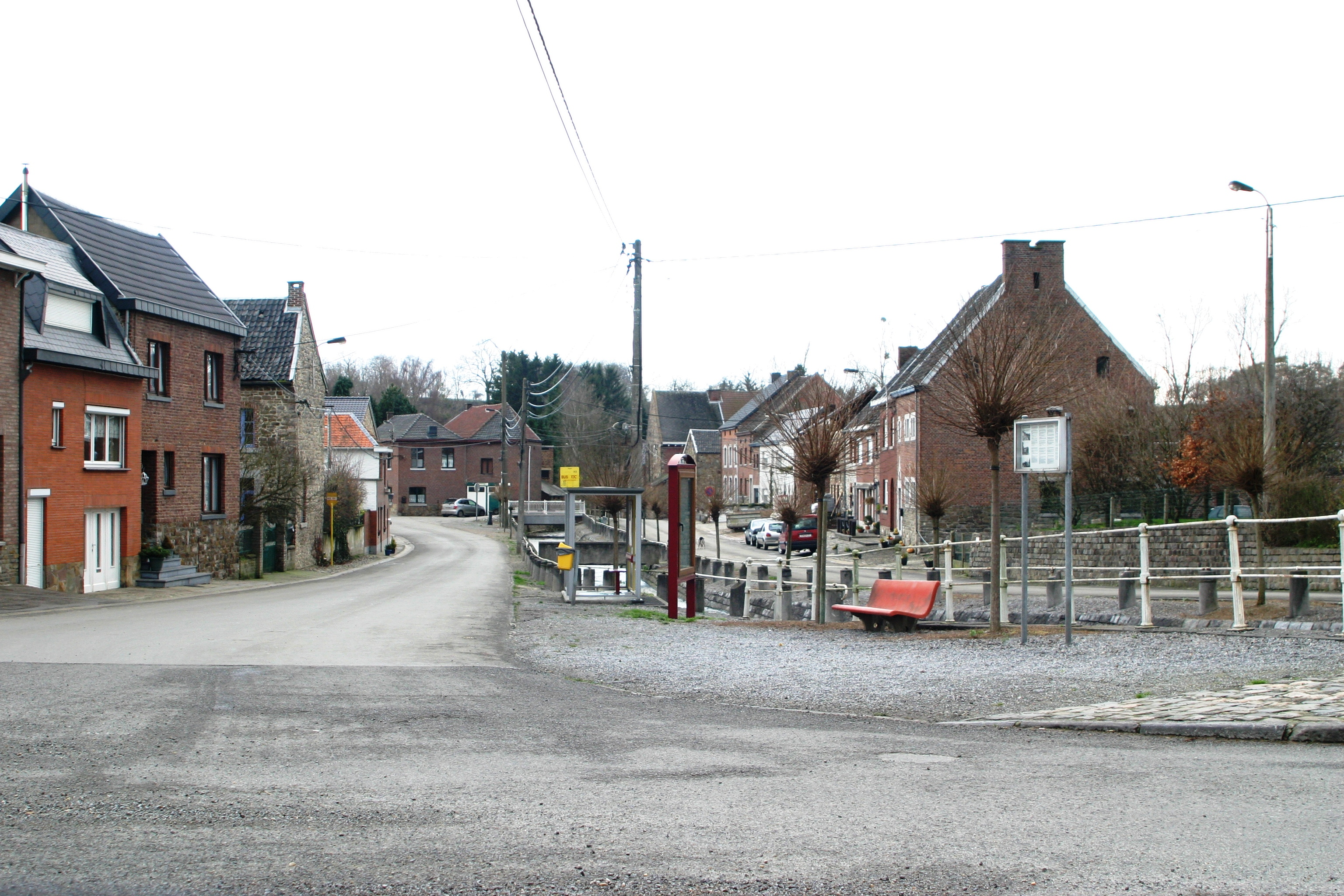 Mortroux Vue an d'Uertschaft déi vum Ruisseau d'Asse an zwee gedeelt gëtt.